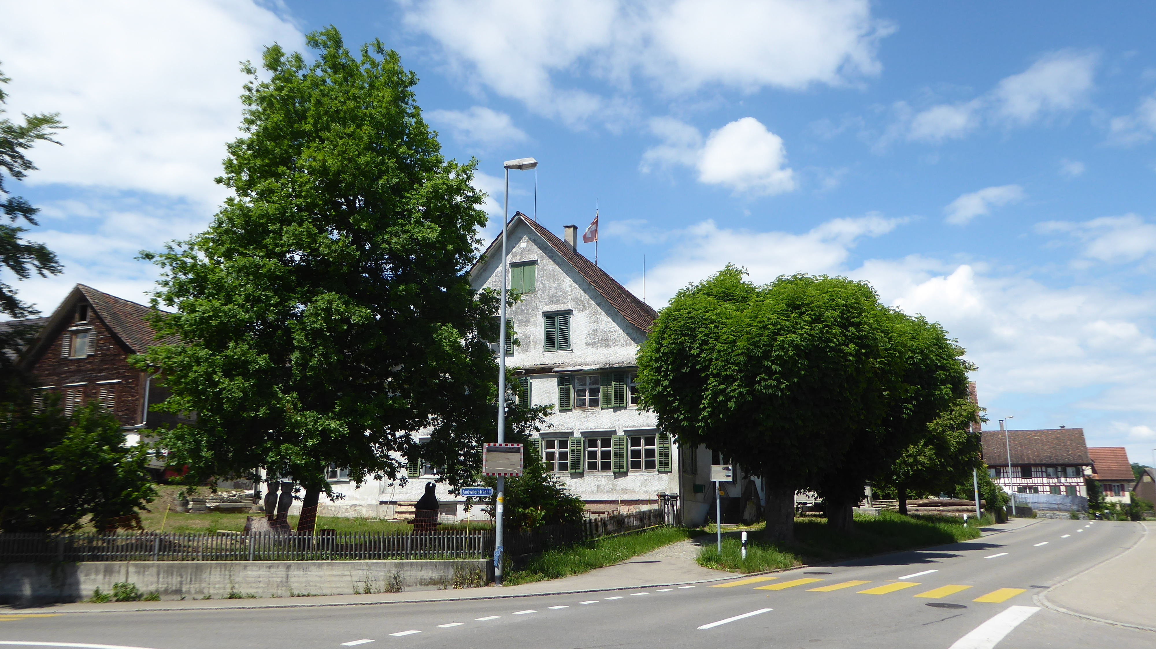 Leimbach